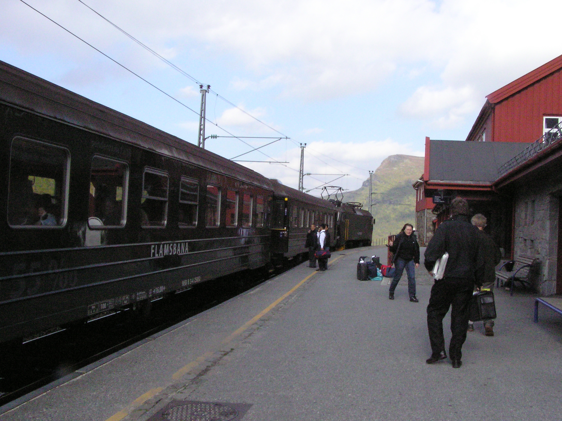 Sign